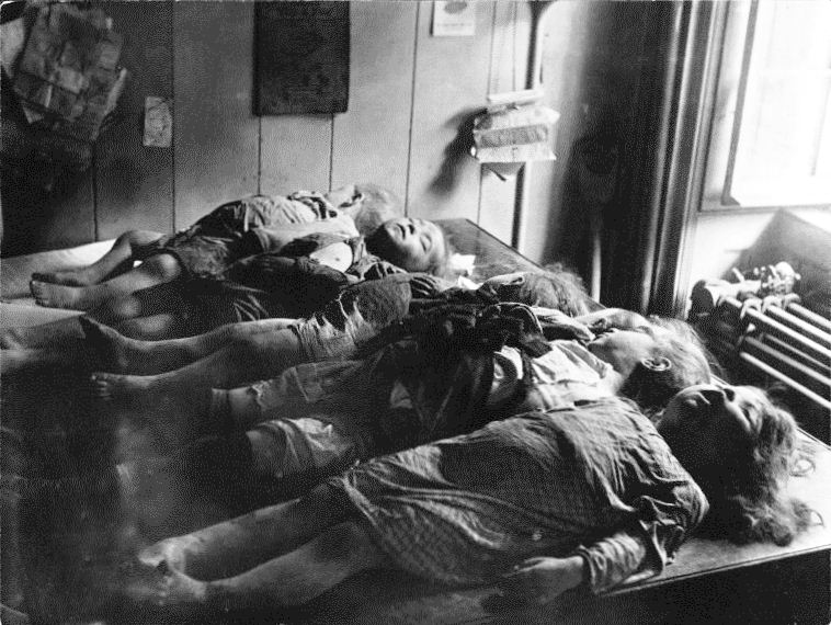 Enfants victimes de l'éboulis du cap Diamant à Québec